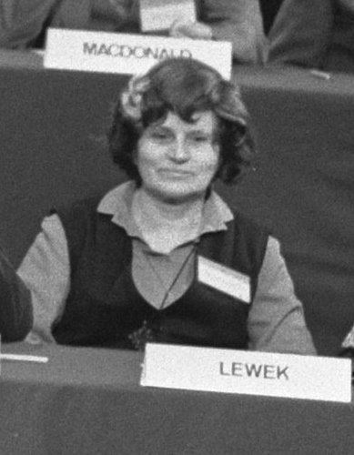 Collectie / Archief : Fotocollectie Anefo Reportage / Serie : Openbare hoorzitting over kernwapens en ontwapening, georganiseerd door de Wereldraad van Kerken in de VU, Amsterdam Beschrijving : Overzicht van de jury Datum : 23 november 1981 Locatie : Amsterdam, Noord-Holland Trefwoorden : hoorzittingen, juryleden Fotograaf : Bogaerts, Rob / Anefo Auteursrechthebbende : Nationaal Archief Materiaalsoort : Negatief (zwart/wit) Nummer archiefinventaris : bekijk toegang 2.24.01.05 Bestanddeelnummer : 931-8205